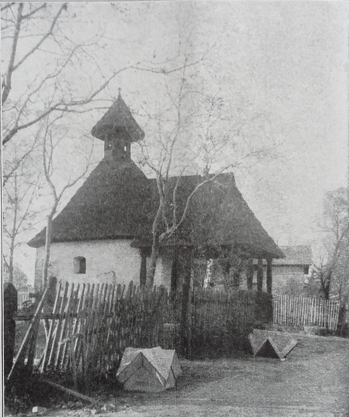 Kapliczka Matki Bożej Bolesnej w Strzybnicy-Piasecznej. Zdjęcie z ok. 1900-1910 r. z miesięcznika "Oberschlesien"